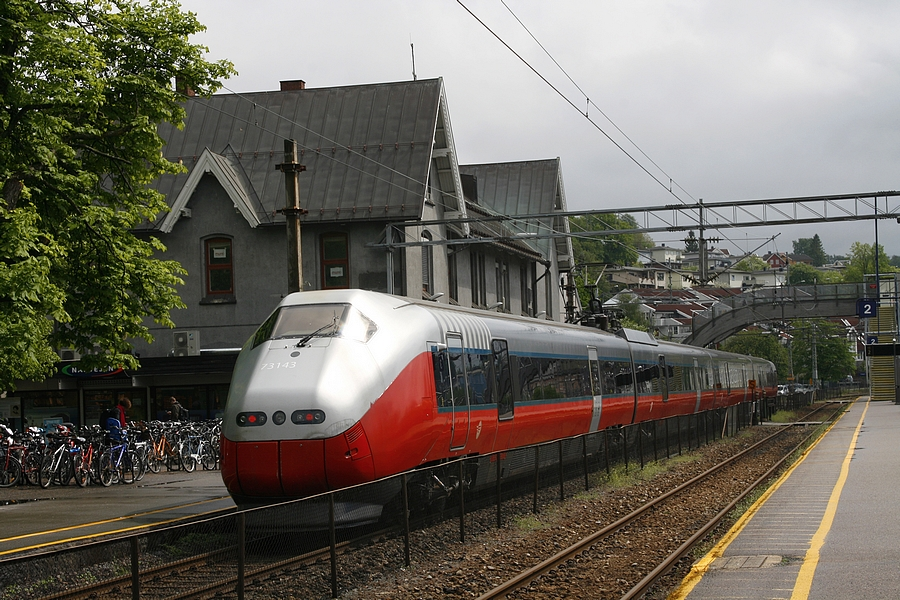 Regiontog på Moss stasjon